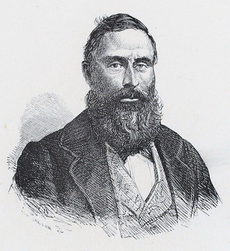 Pietro Romeo